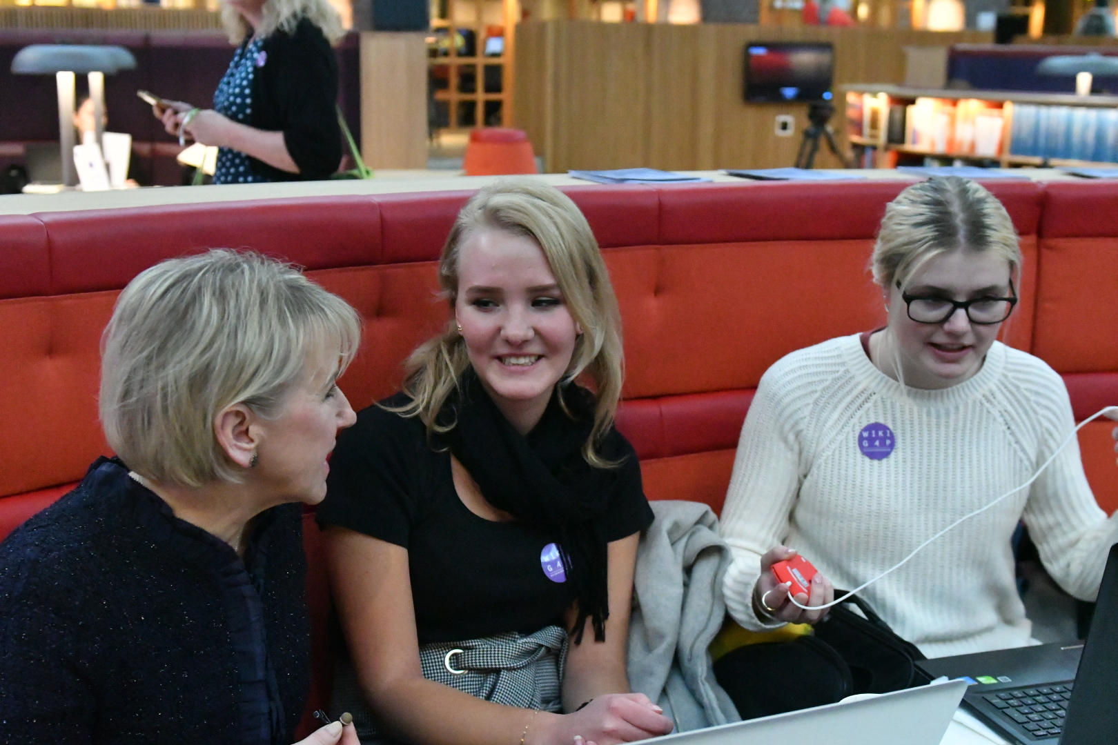 Skrivstugan WikiGap på internationella kvinnodagen 2018-03-08. Skrivstugan är ett samarbete mellan Wikimedia Sverige och Utrikesdepartementet och anordnades på KTHs bibliotek.